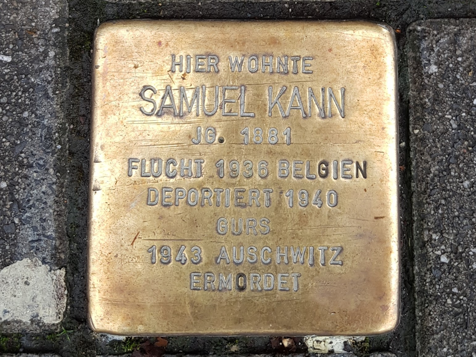 Ort: Mülheimer Str. 124